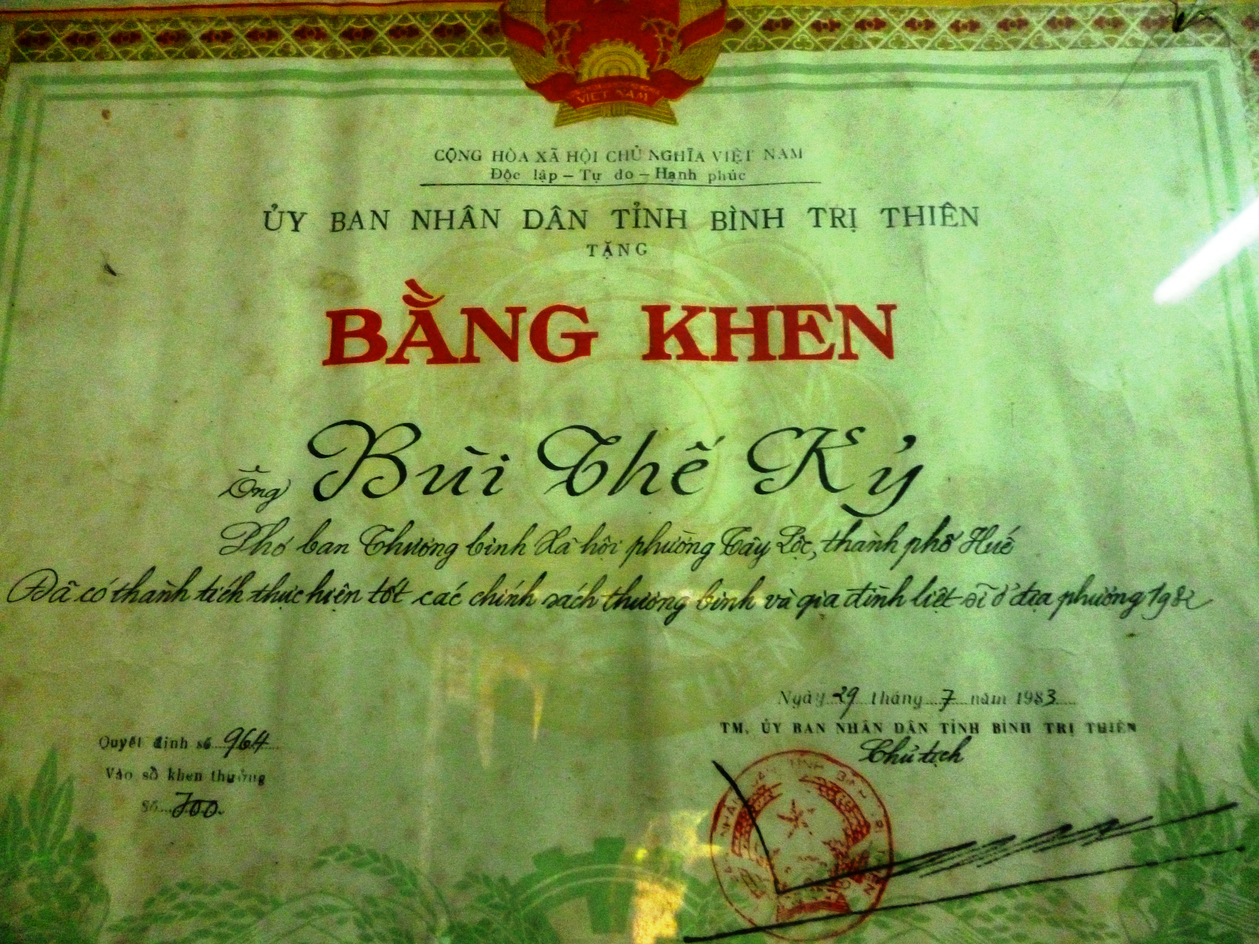 Hình tự chụp bằng máy cá nhân về một Bằng khen của tỉnh Thừa Thiên Huế tặng năm 1983